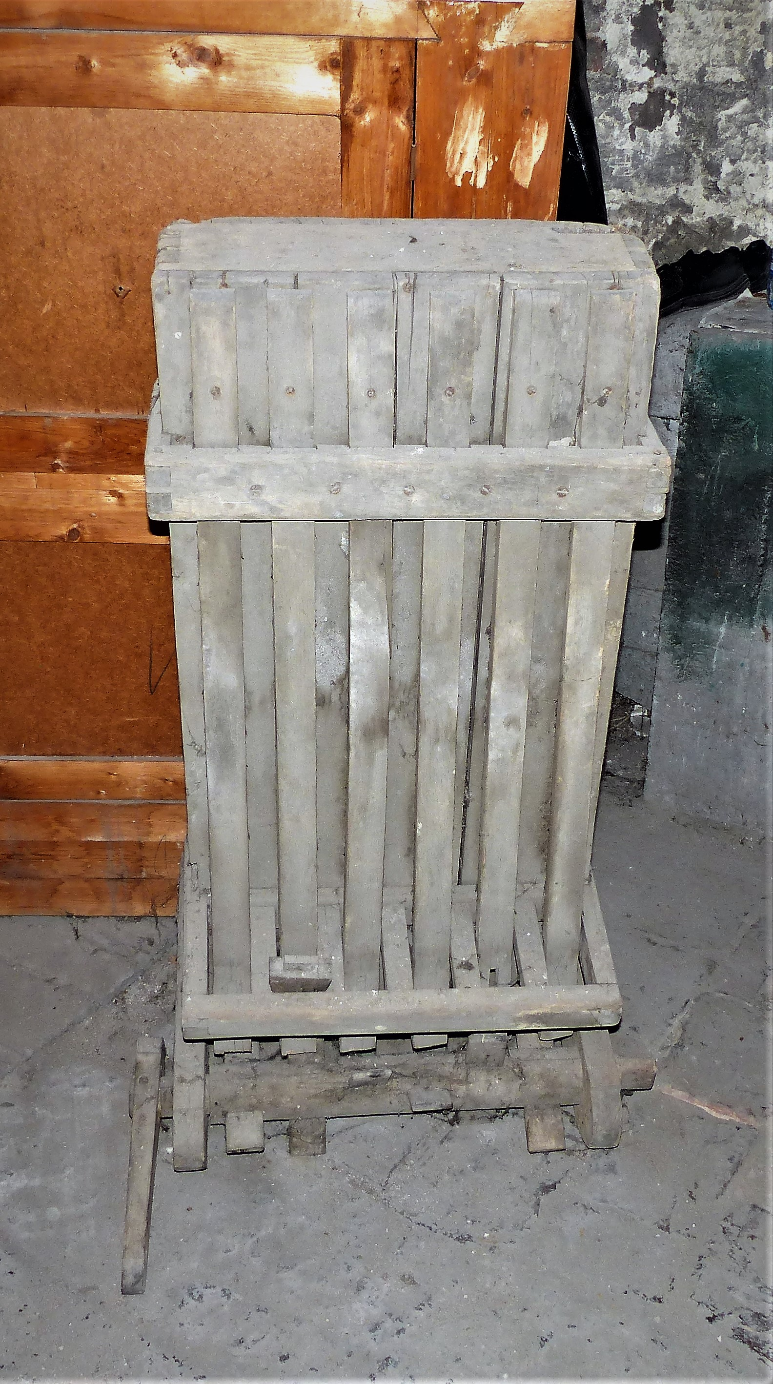 Kereplő. A felvétel 2018. február 24-én, szombaton készült az Ávilai Nagy Szent Teréz-plébániatemplom tetőszintjén.